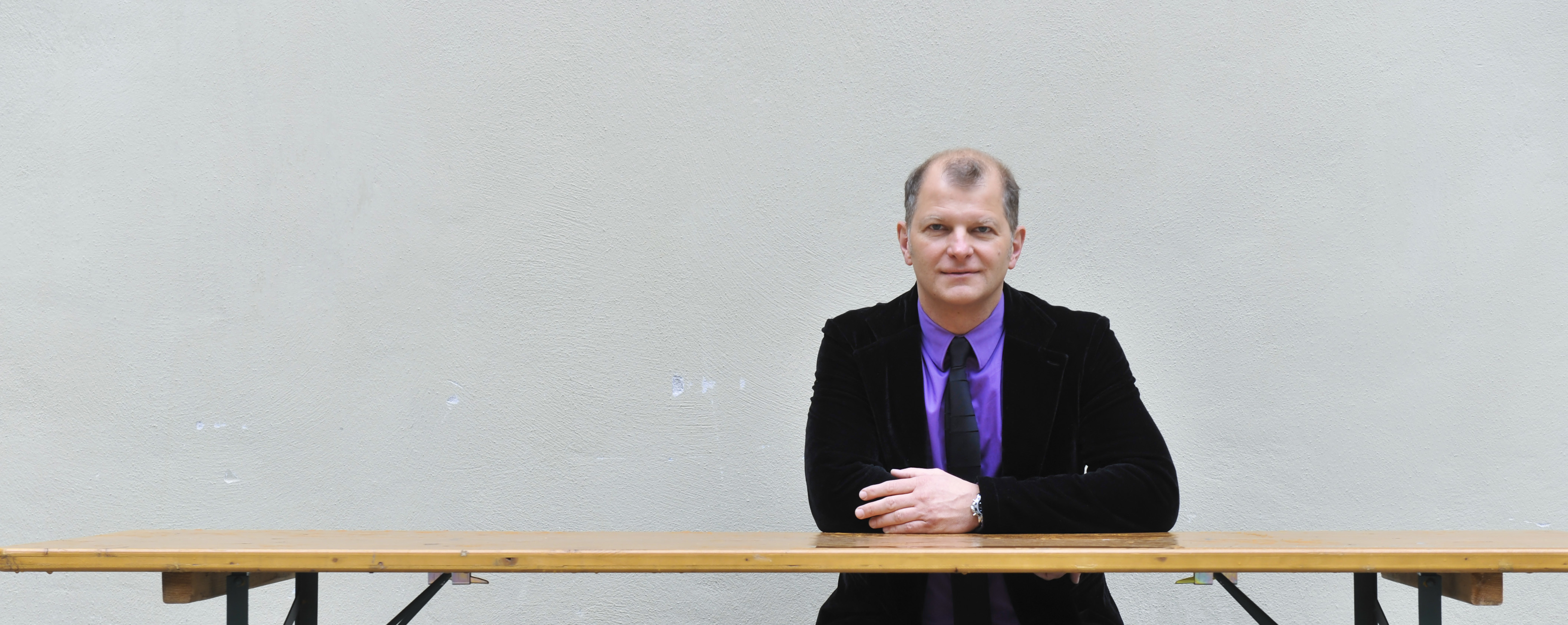 Martin Kušej fotografiert von Alessandra Schellnegger